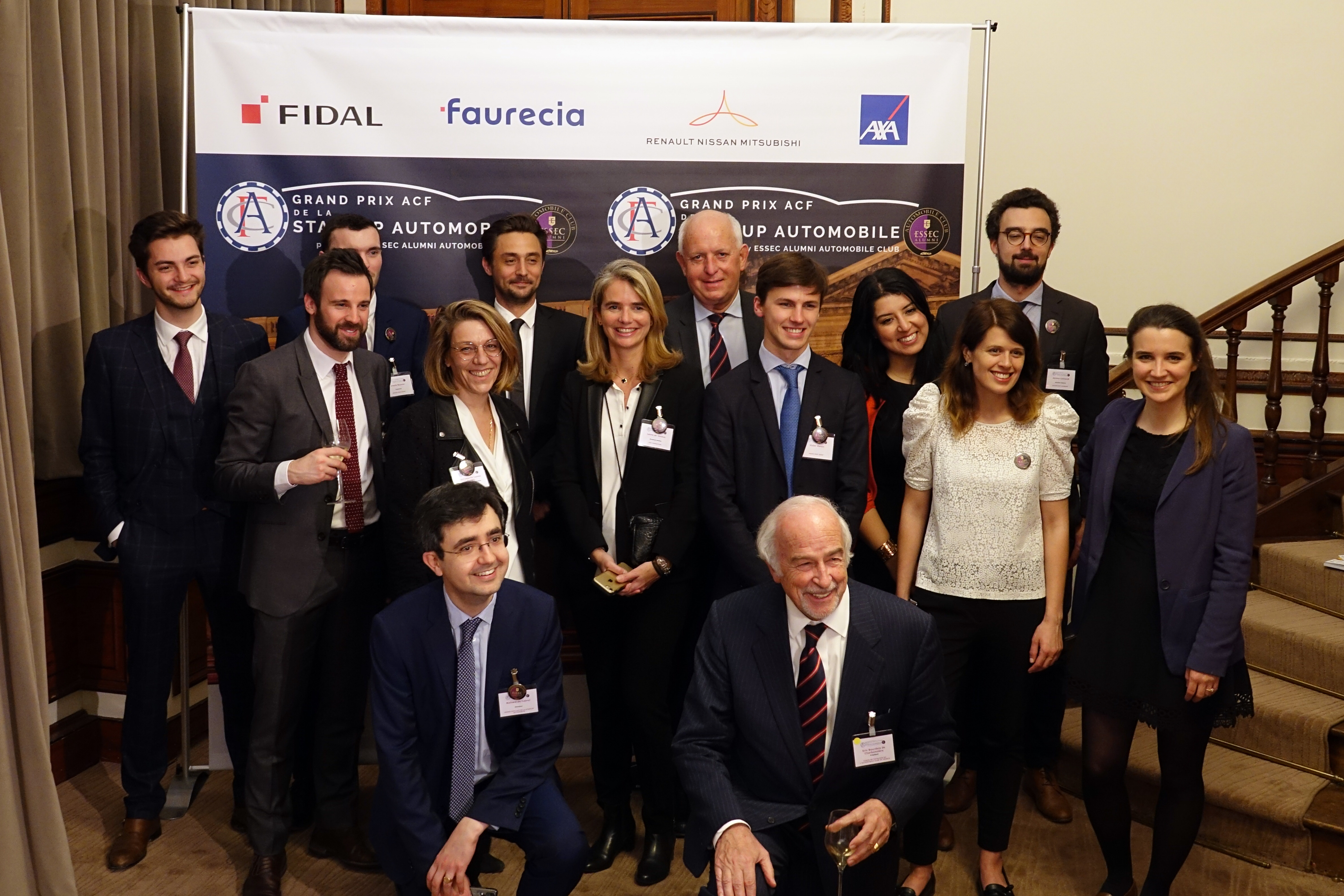 Grand Prix ACF de la Startup Automobile 2019